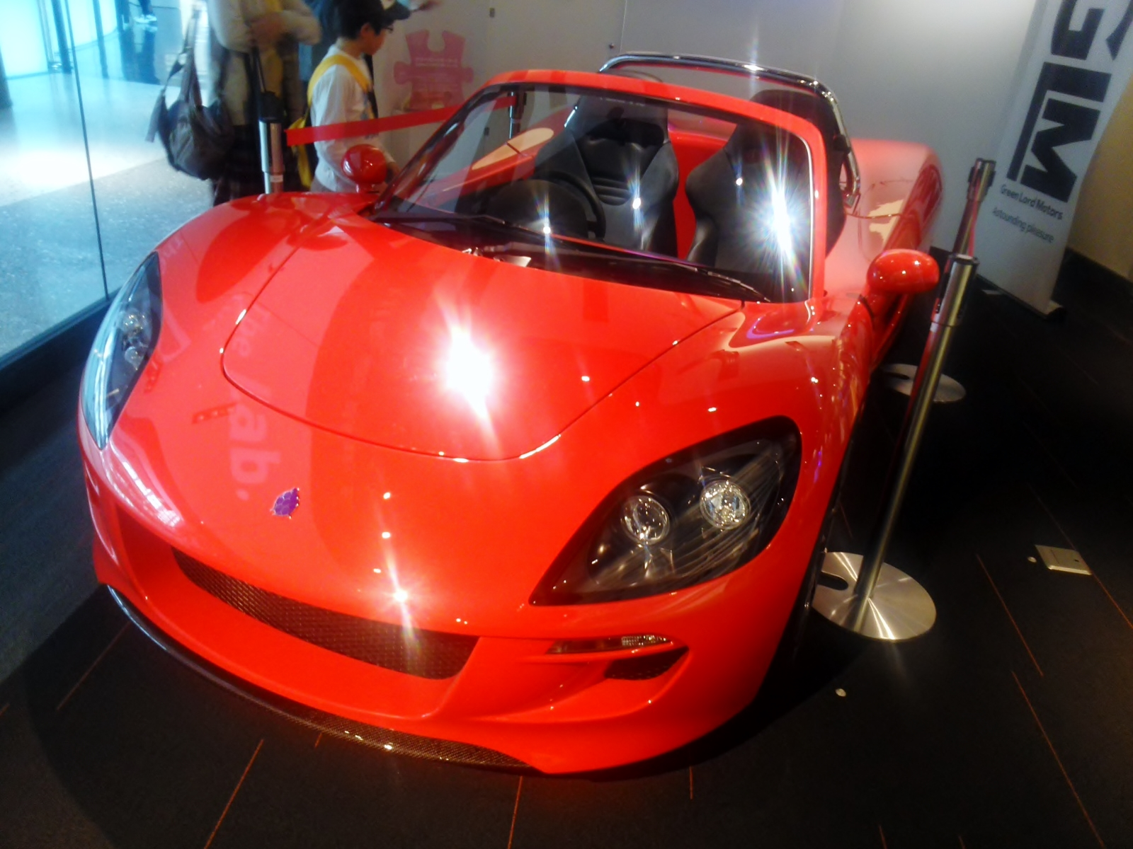 グランフロント大阪展示から1年経った同日にトミーカイラ・ZZのグリーンロードモータースによる電気自動車仕様をフロントから撮影。